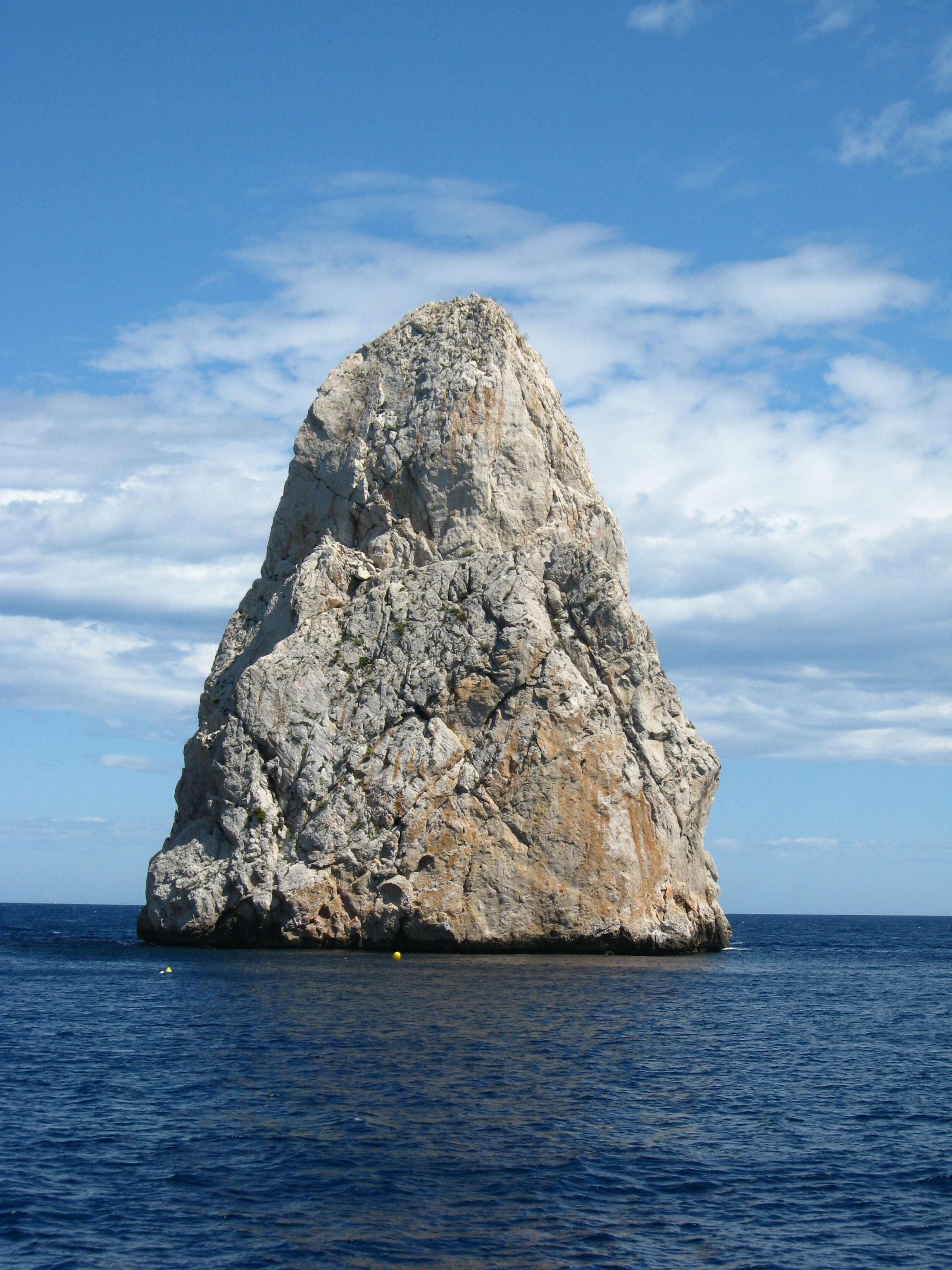 Medes-Insel bei L’Estartit Datum: 09.09.2010 Urheber: Michael Pfeiffer alias Benutzer:Gordito1869 Quelle: privates Fotoarchiv des Urhebers